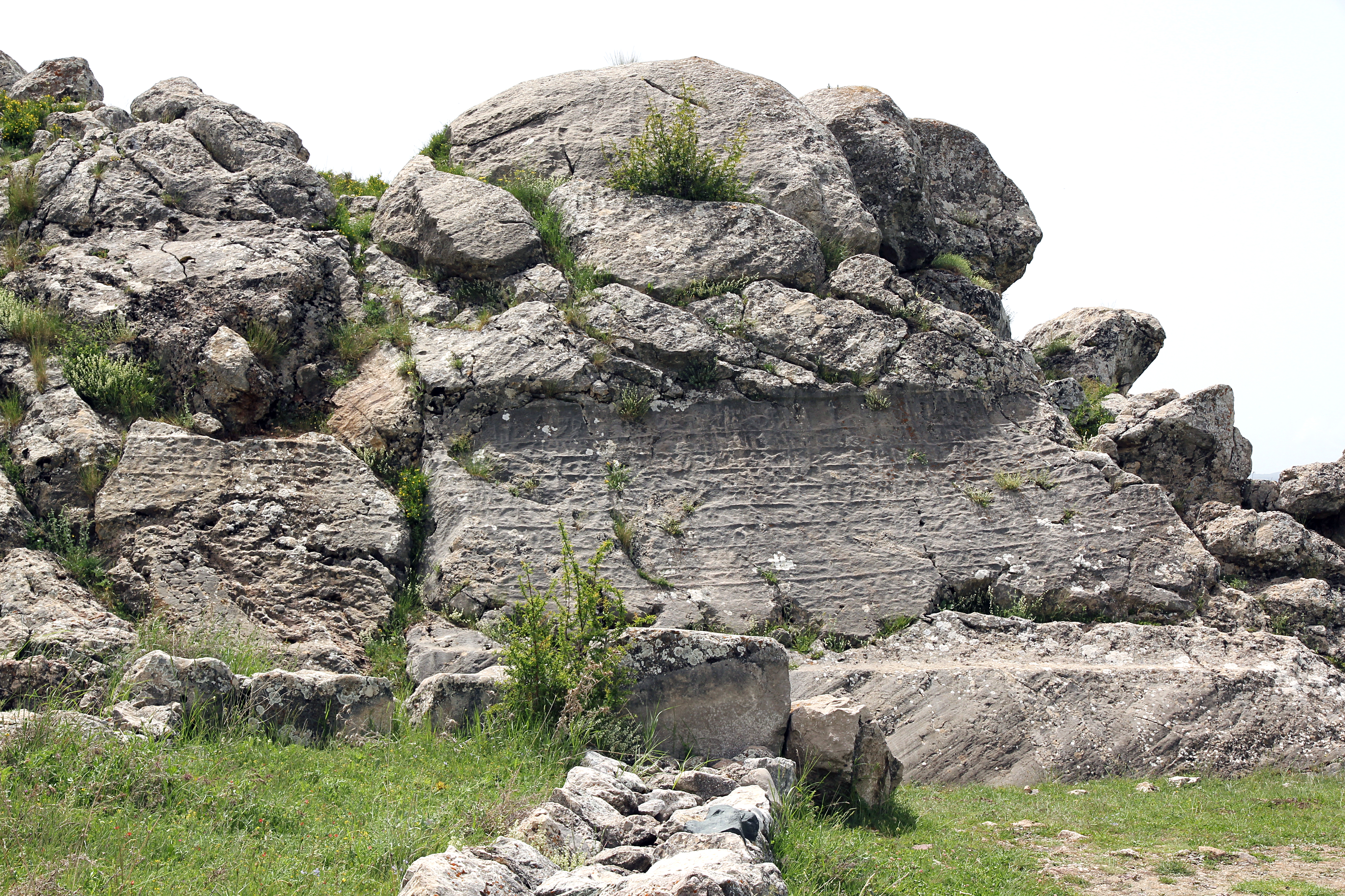 Ḫattuša, hethitische Hauptstadt bei Boğazkale, Zentraltürkei, Nişantaş